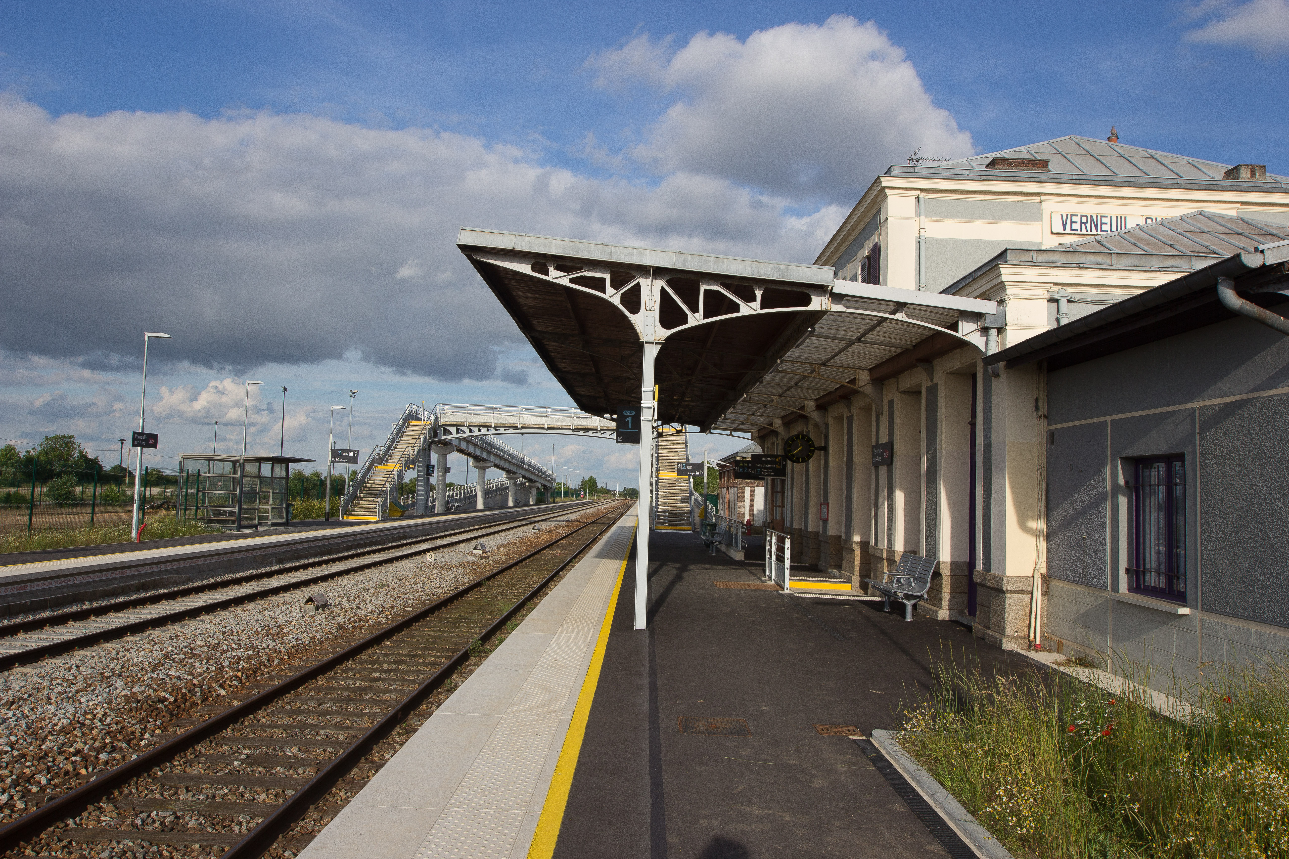 Gare de Verneuil-sur-Avre / Département de l'Eure / Région Normandie / France